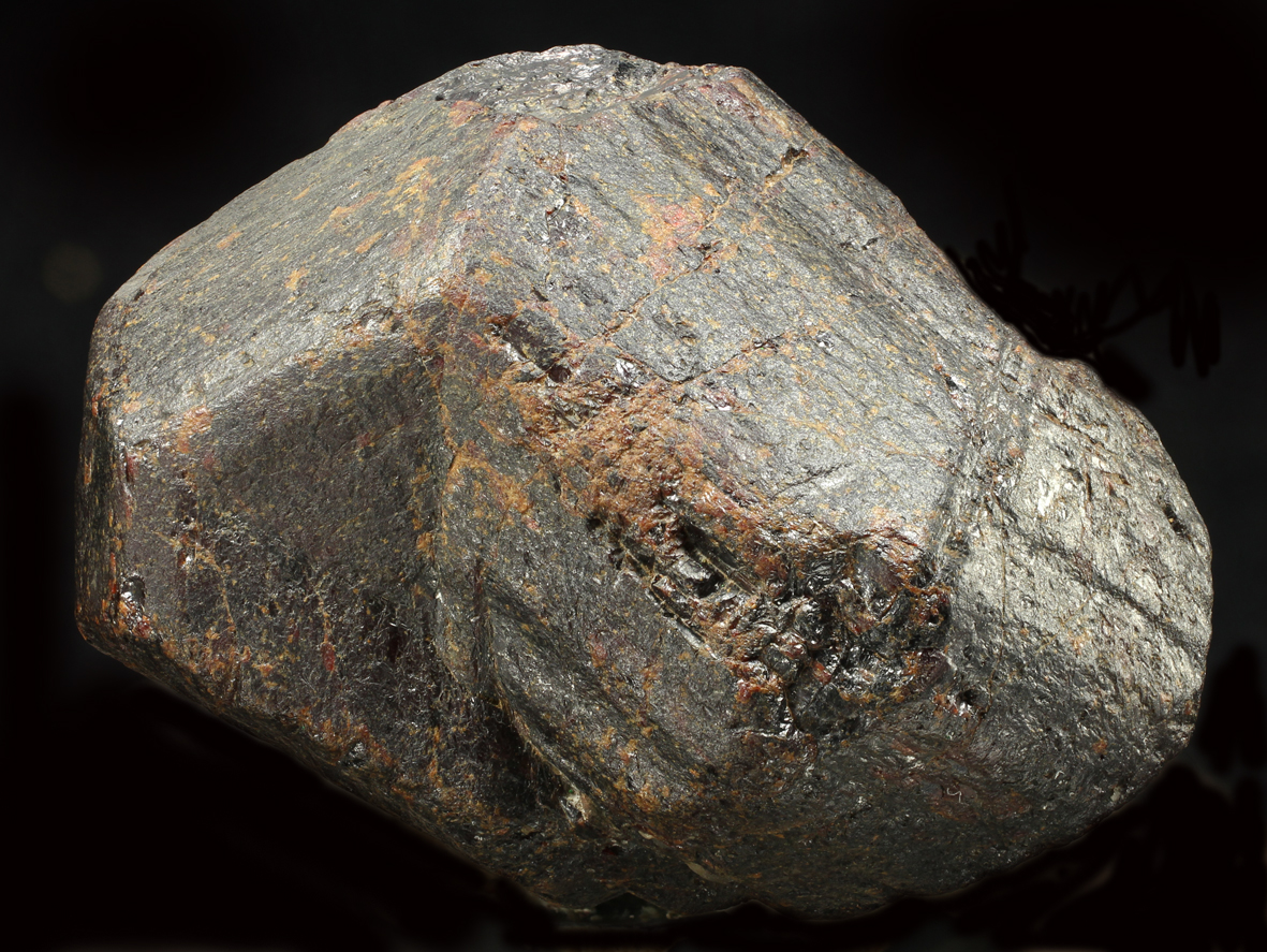 Rutilo. Macla múltiple rodada. Cerro de la Mata de la Cabeza. Horcajuelo de la Sierra (Madrid) España. Localidad tipo. 3,5 cmFoto J. Callén. Col. M. Calvo